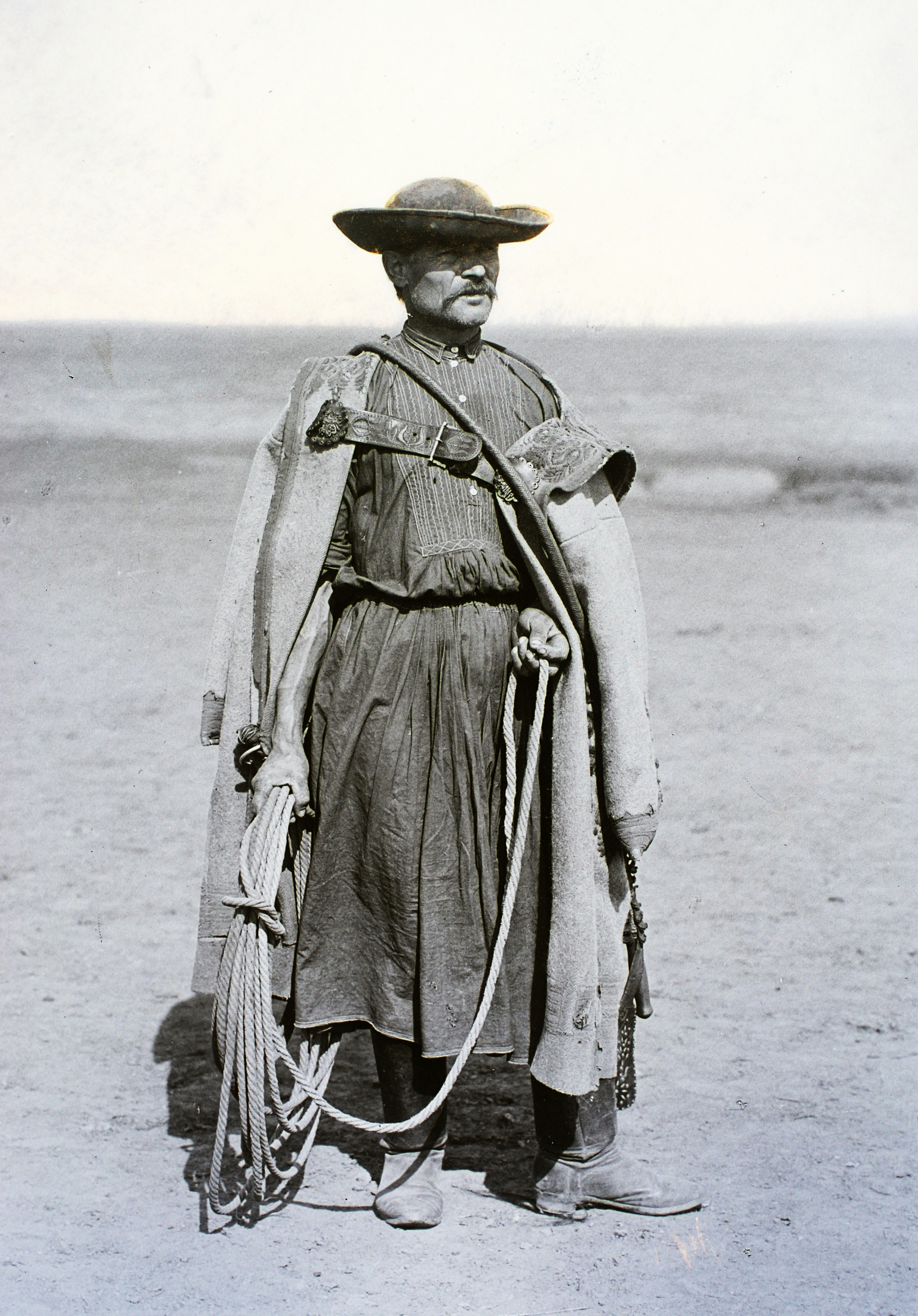 csikós. Location: Hungary, Hortobágy Tags: bullwhip, folk costume, wrangler, tether, archaic mantle, boots, pants Title: csikós.